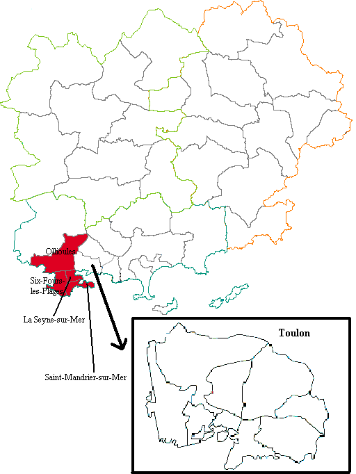 La septième circonscription législative du département du Var (France)